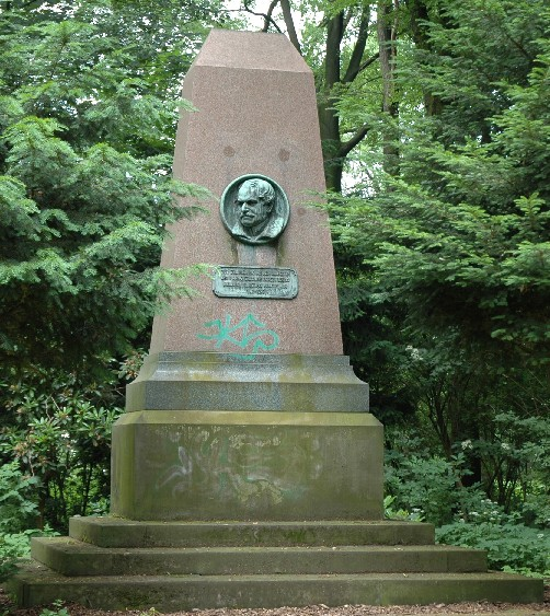 Burckhardt-Denkmal in der Eilenriede in Hannover, 1889 von Carl Dopmeyer gestaltet